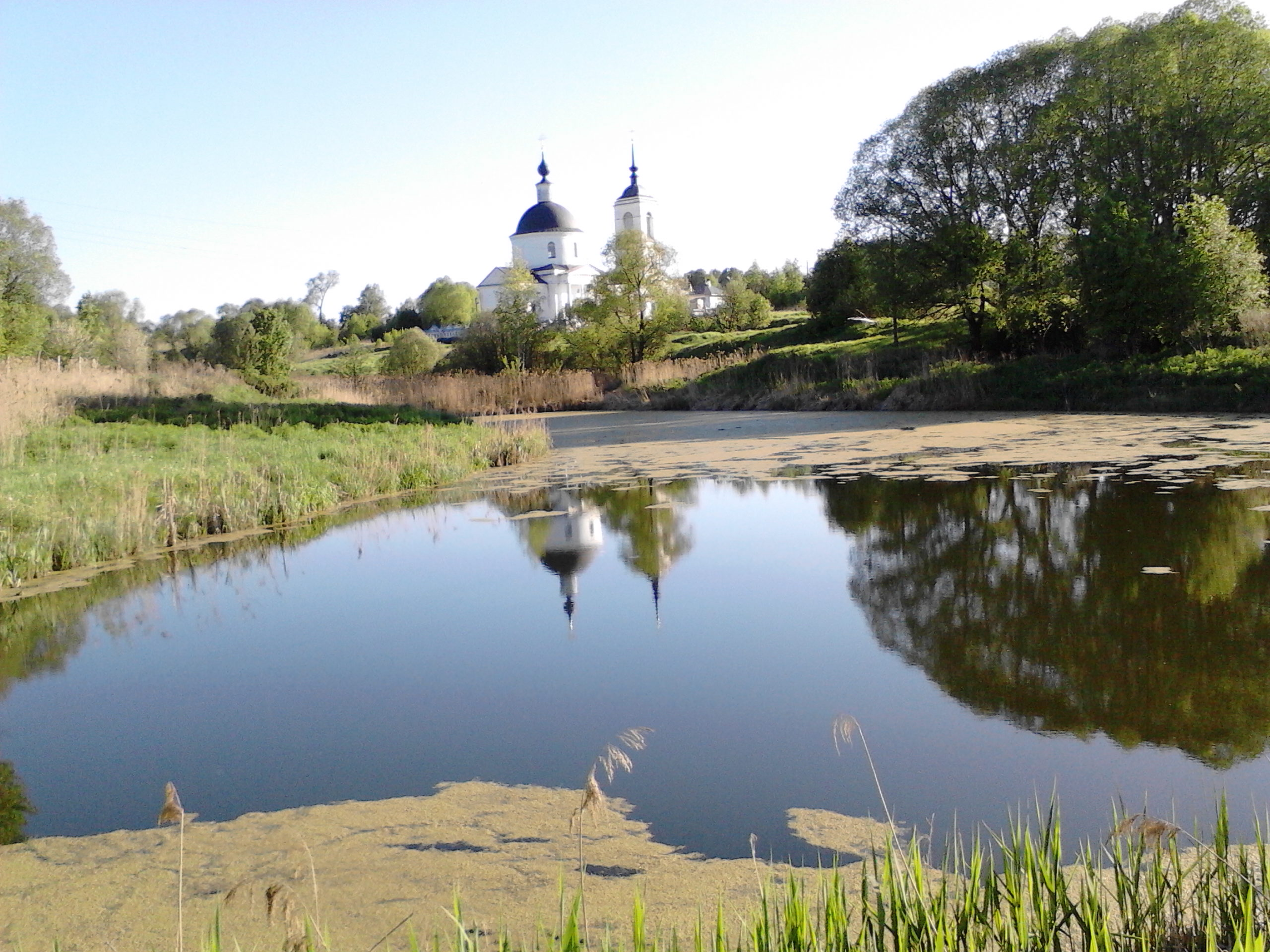 Церковь святителя Николая: Новое, Юрьев-Польский район, Владимирская область